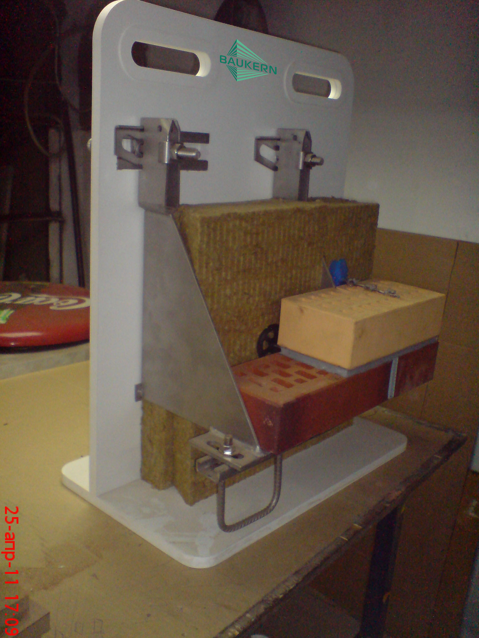 Применение кронштейнов Jordahl для крепления облицовки кирпичом